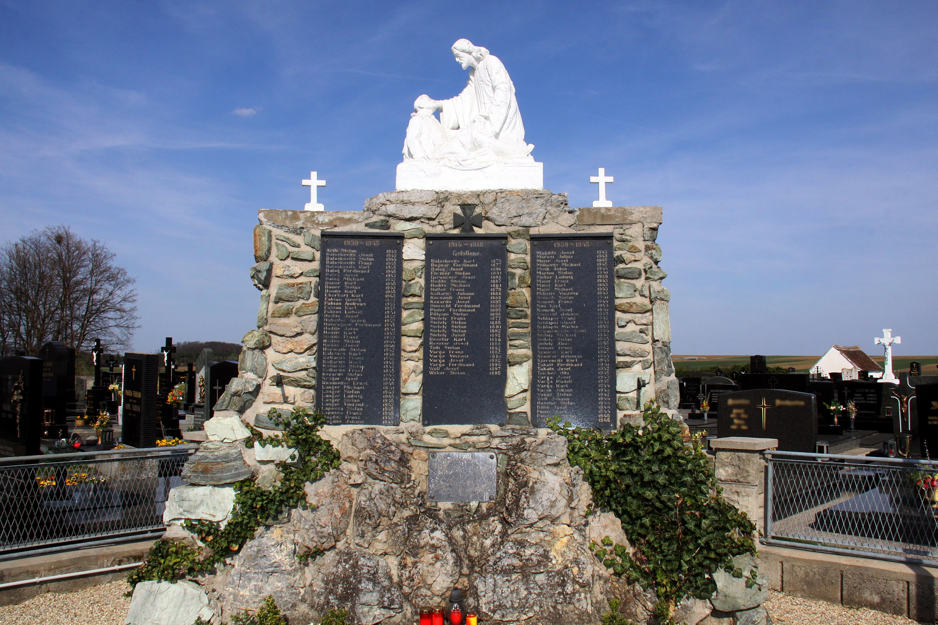 Schachendorf - Kriegerdenkmal neben Pfarrkirche